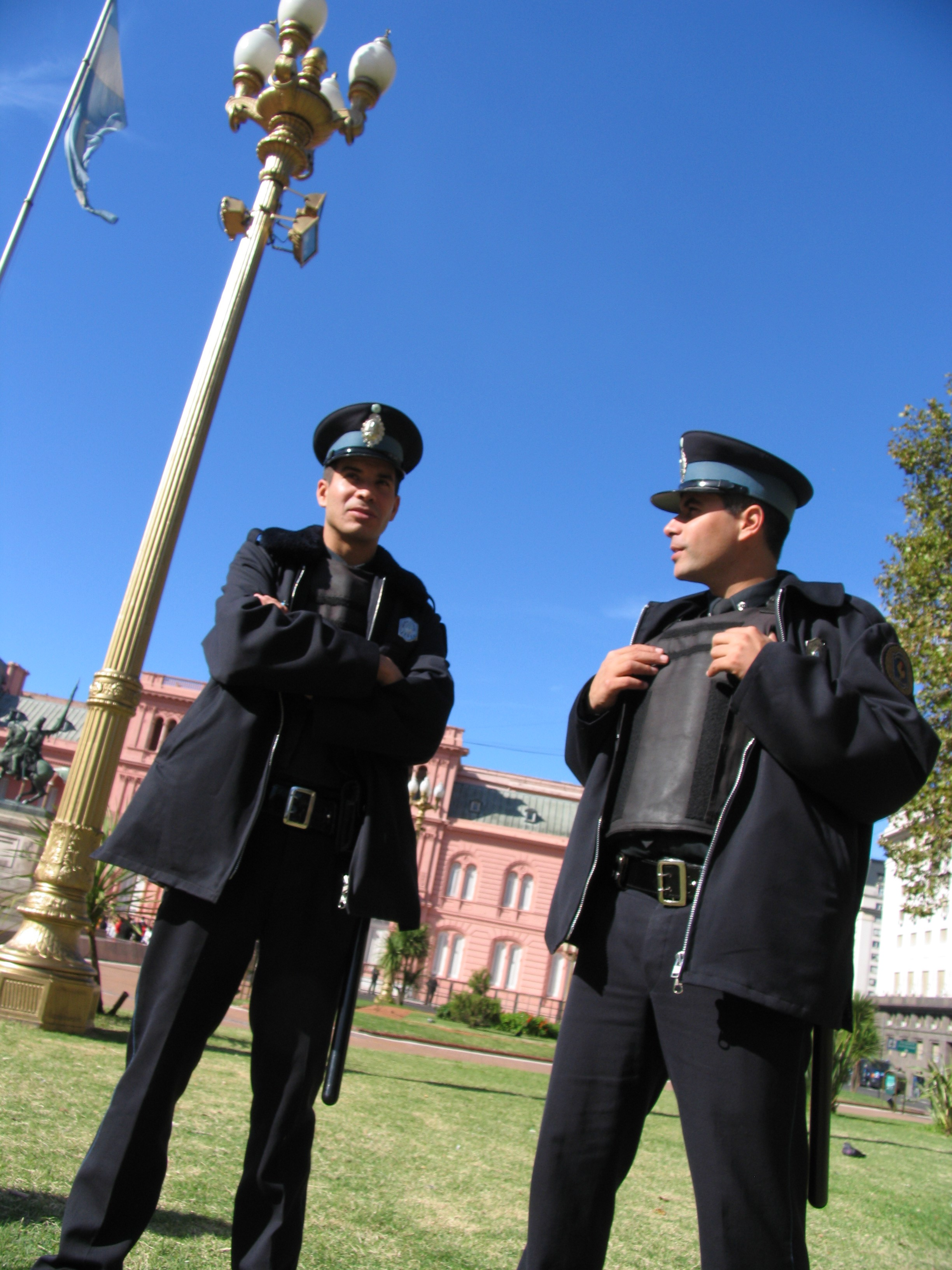 Agentes de la Policía Federal Argentina en la Plaza de Mayo, Buenos Aires, Argentina.